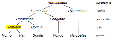 Cladograma dels hominoïdeus.